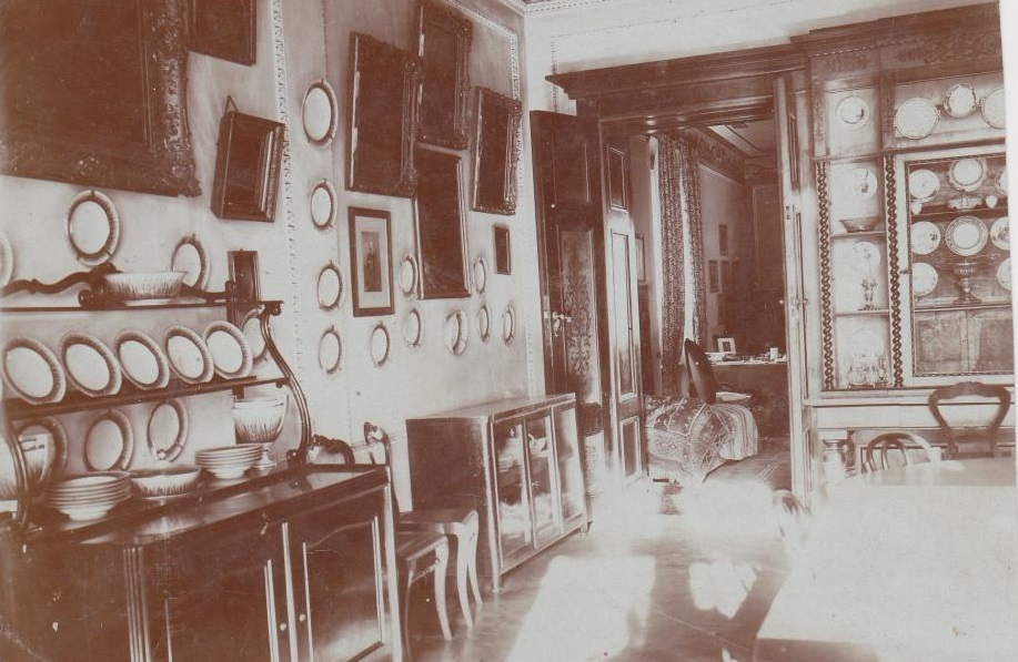 Zbylitowska Góra pałac wnętrze początek XX w.